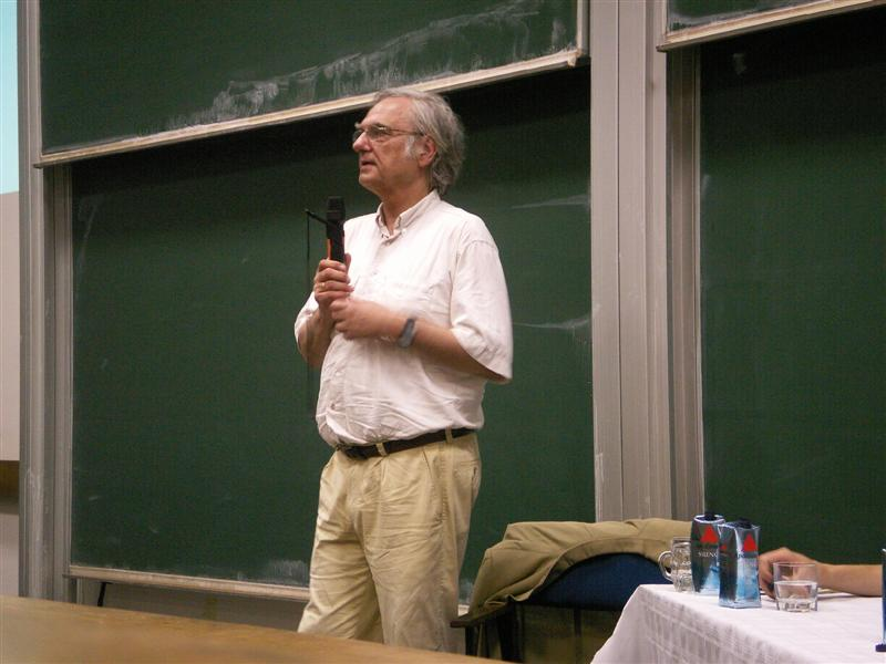 Prof. Dr. Dieter Birnbacher